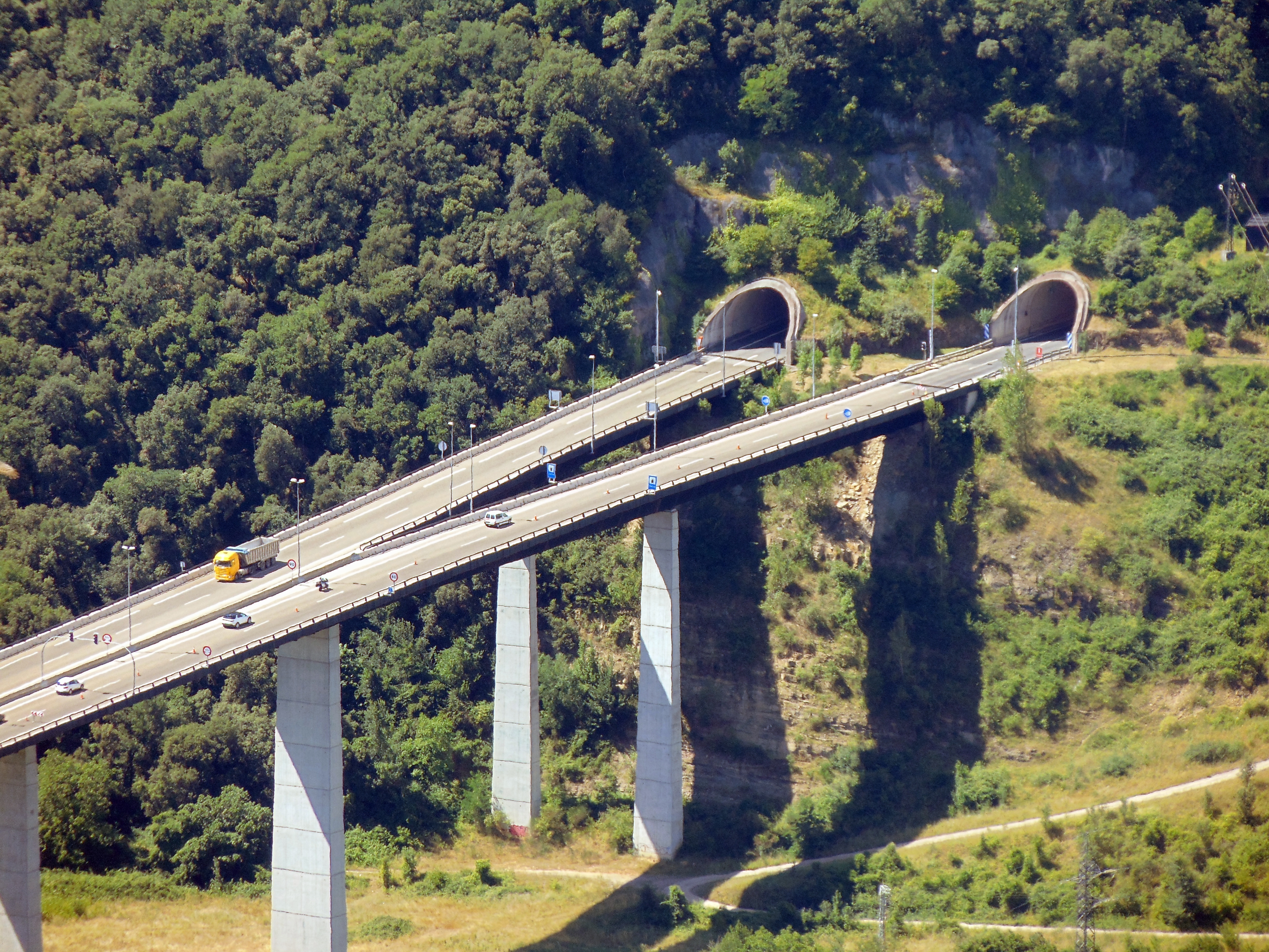 Santuari de la Mare de Déu del Cós (Montagut i Oix)